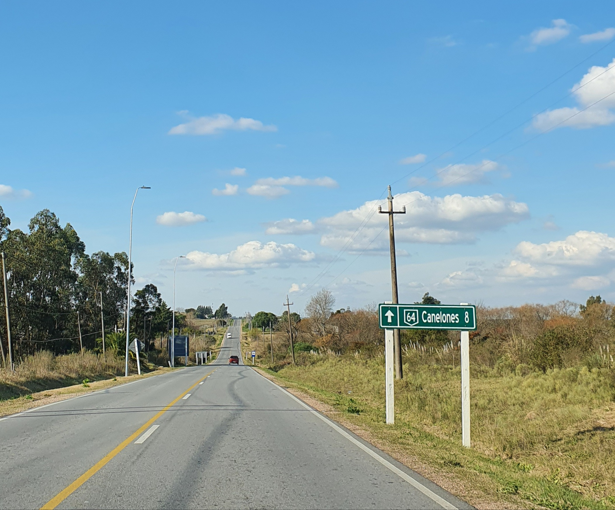 Ruta 64 hacia el este, en Empalme Doglioti (R46), Uruguay